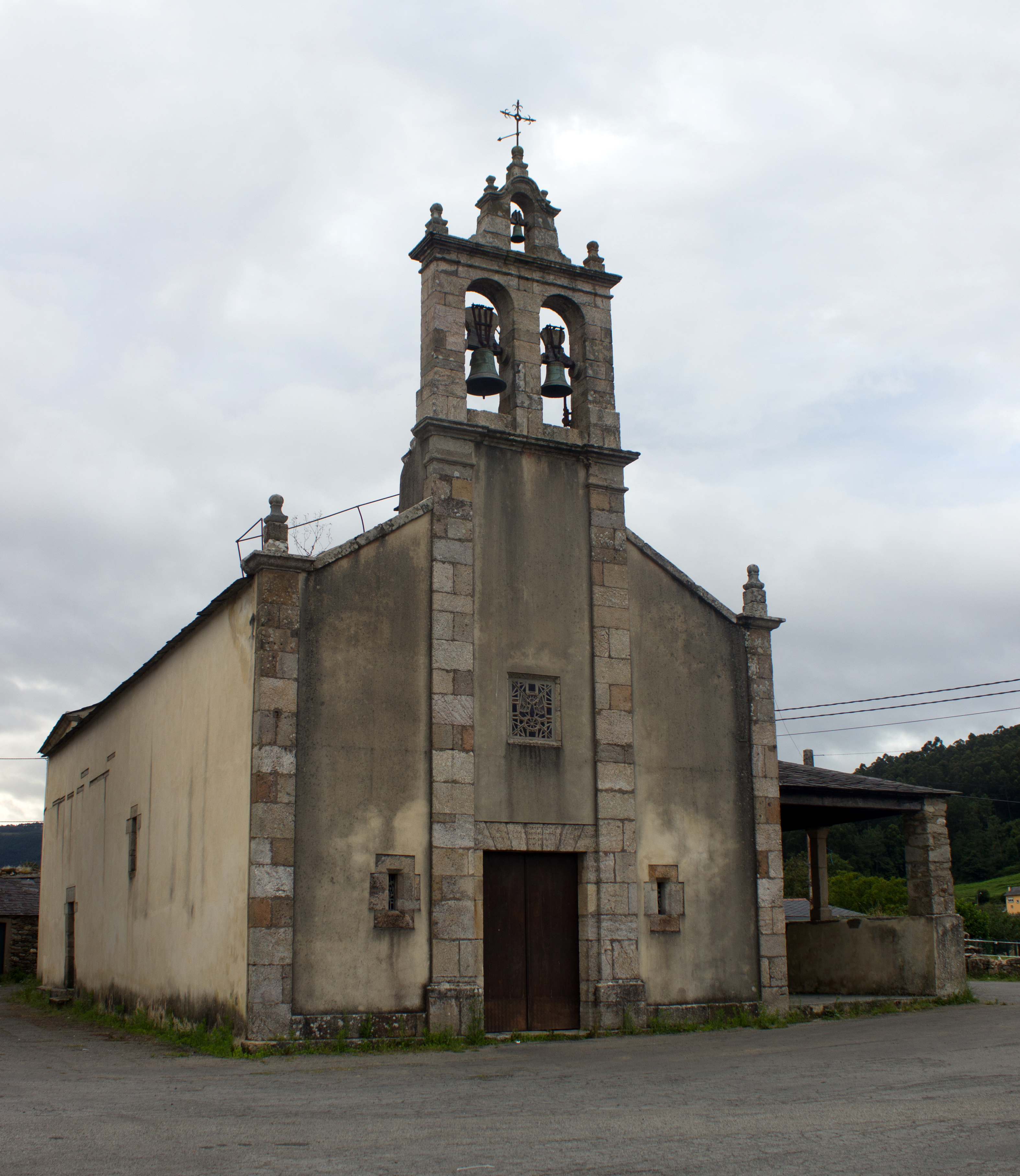 Igrexa de San Xiao de Landrove no concello de Viveiro.